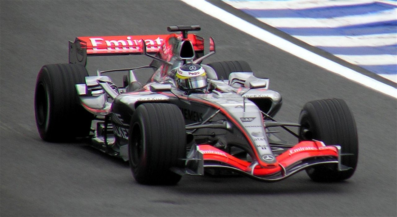 Formula One 2006 Rd.18 Interlagos: #4 Pedro de la Rosa (McLaren)